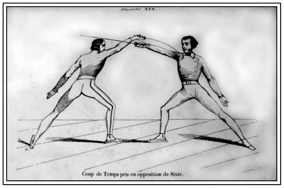 Альфред Декаен, Иллюстрация к A.J.J. POSSELLIER, "La théorie de l'escrime enseignée par une méthode simple basée sur l'observation de la nature"